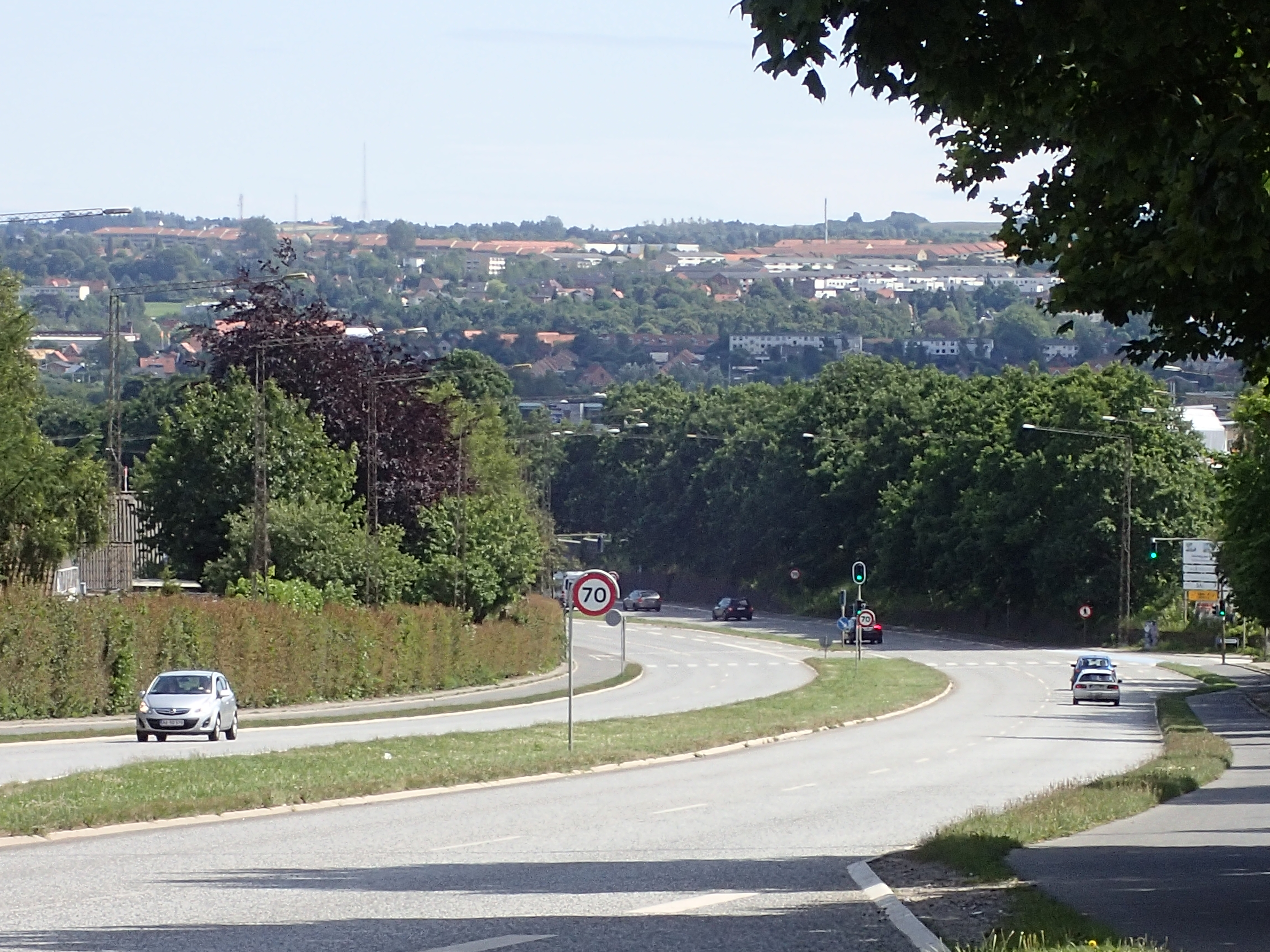 Viby Ringvej med udsyn over Aarhus Ådal.